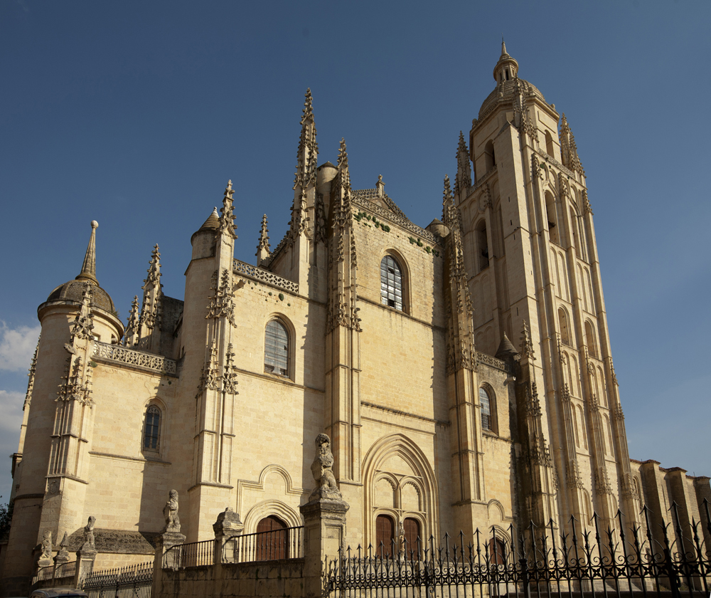 Cultural Heritage Spain RI-51-0000862